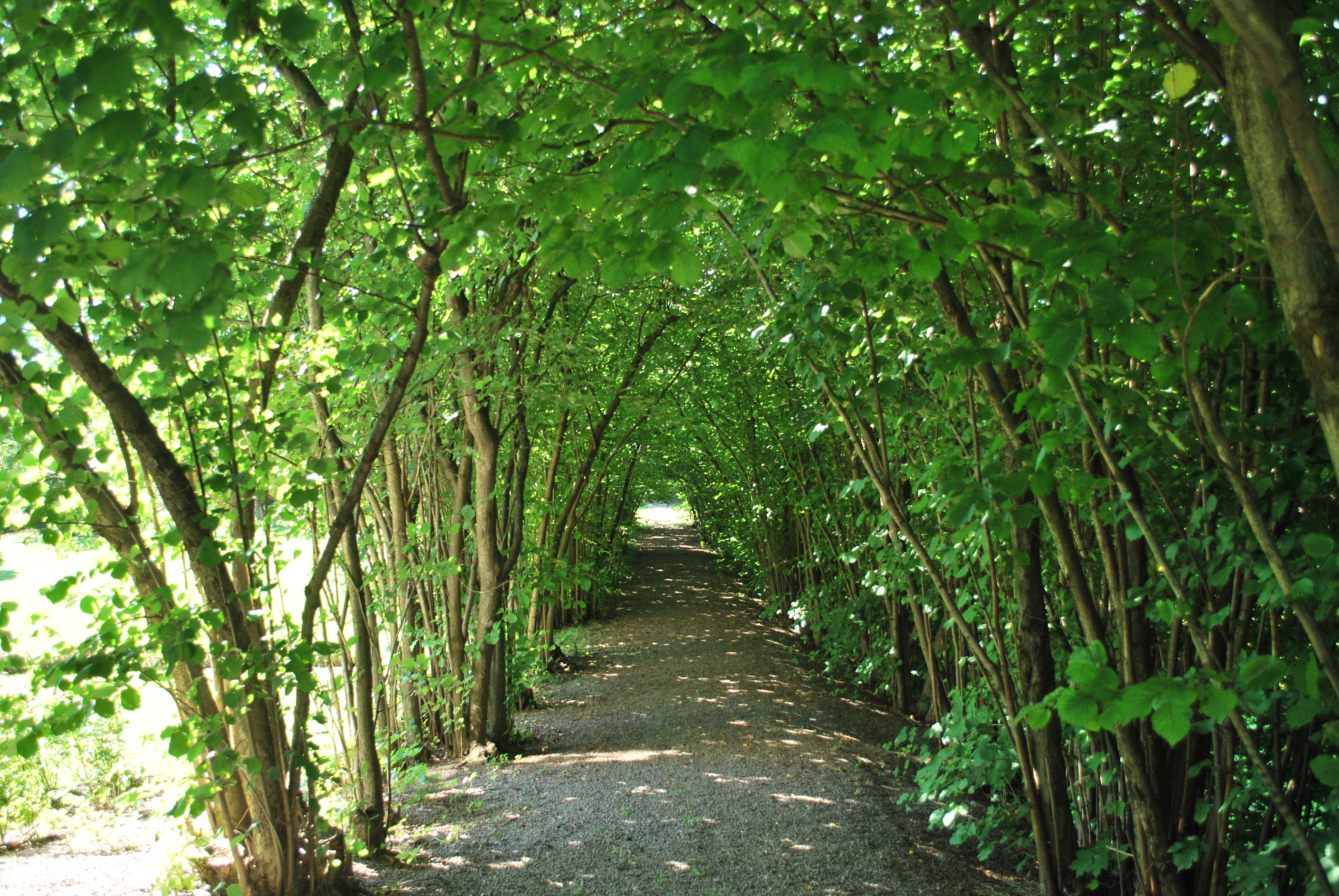 Linderud gård, hasseltunnel, utgjør vestre vegg av hovedhagen